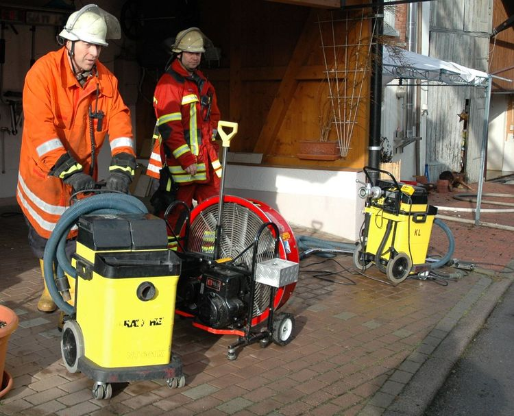 Sauger zum Entfernen von Löschwasser und Lüfter für den Einsatz nach einem Brand.